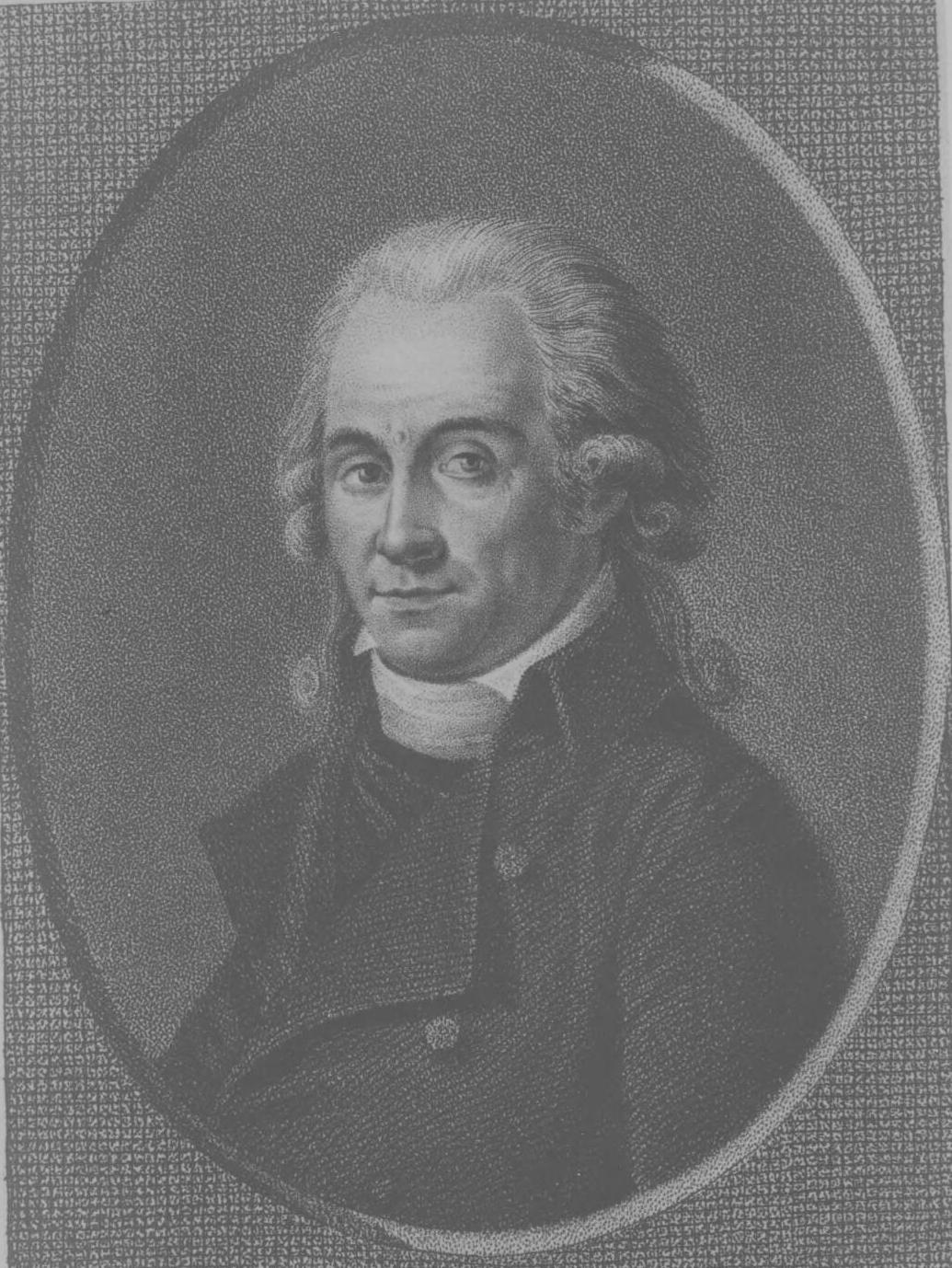 Portret van Henri Daniel Guyot. Iets verkleind en verscherpt.